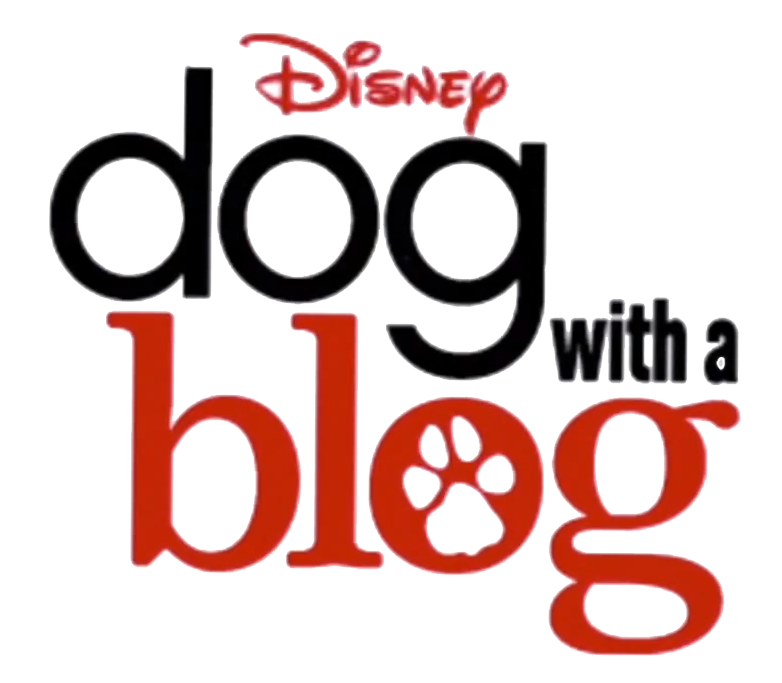 Logo de Dod whit a Blog